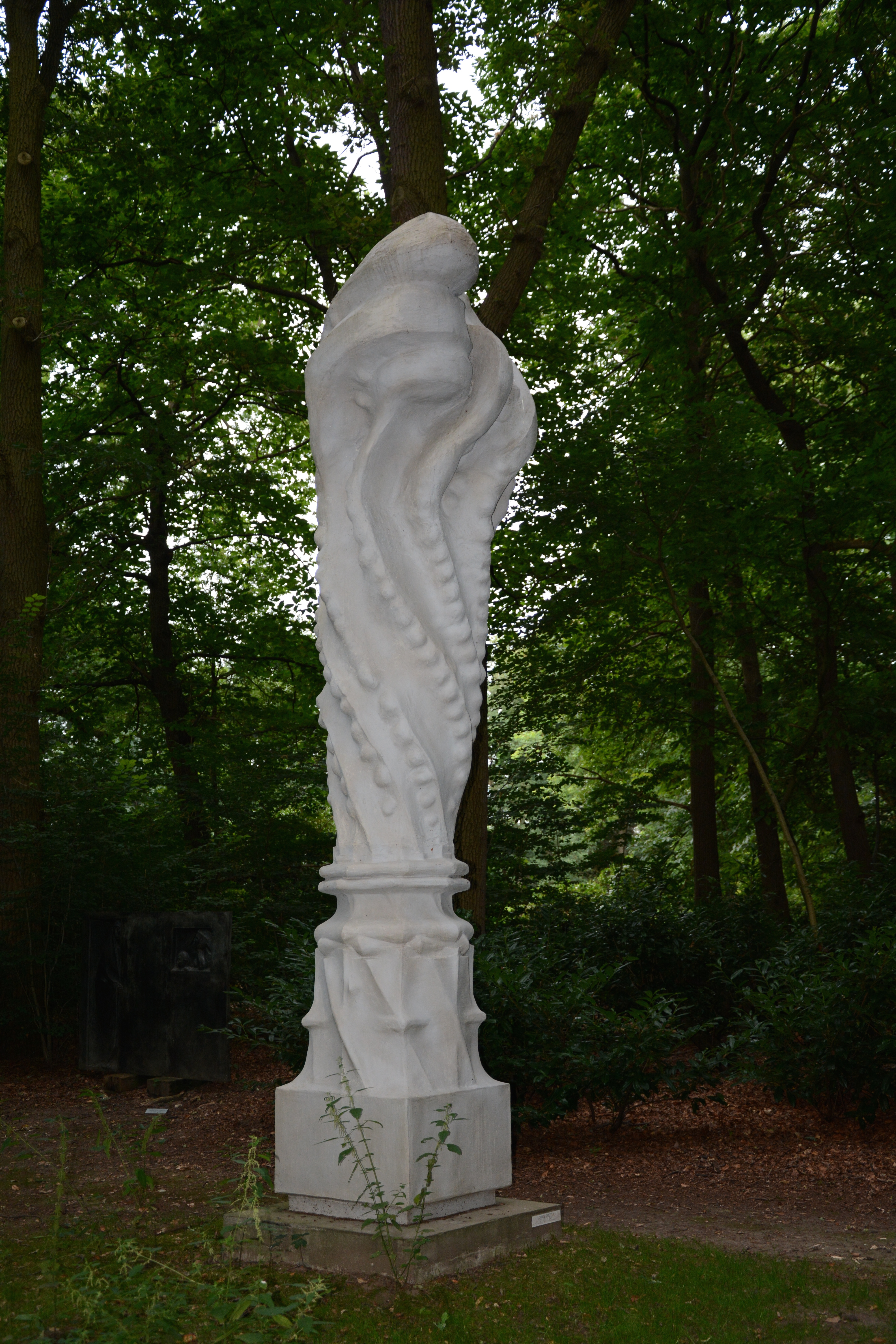 Johan Creten, De Zuil, 2010